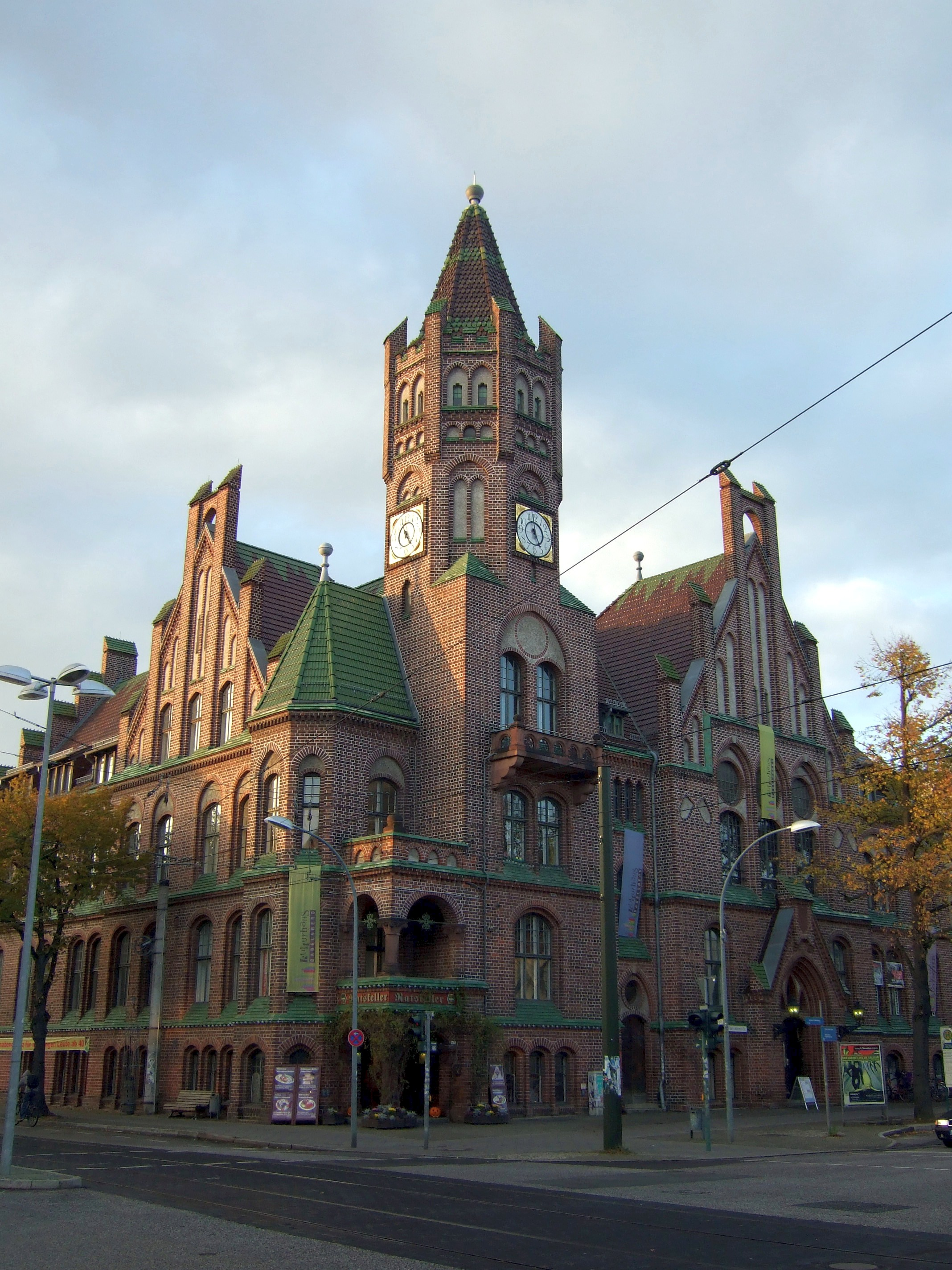 Altes Rathaus in Potsdam-Babelsberg.